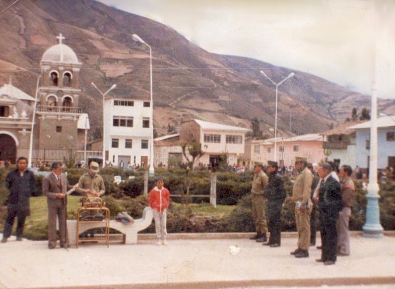 La Plaza antigua de Pampas